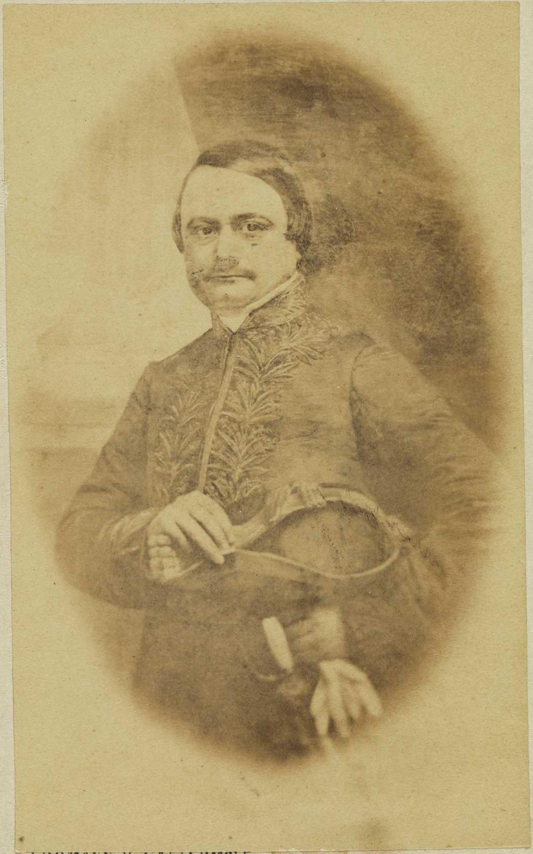 José Bergés